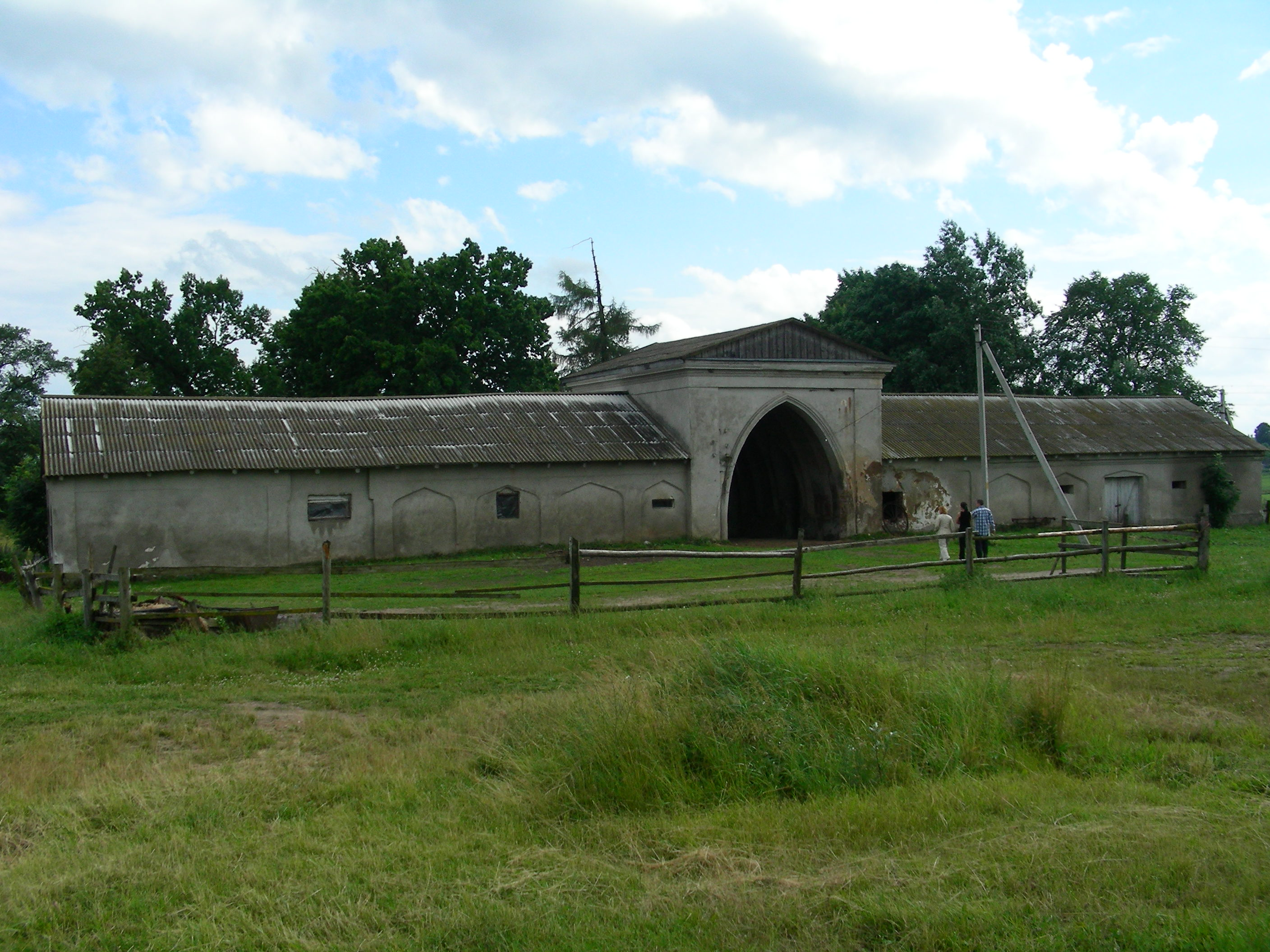 Беларуская (тарашкевіца): Сядзіба (уязная брама, стайні, сьвіран). в. Вялікая Ліпа This is a photo of Belarusian heritage monument. Reference number: 613Г000486 ( WLM)